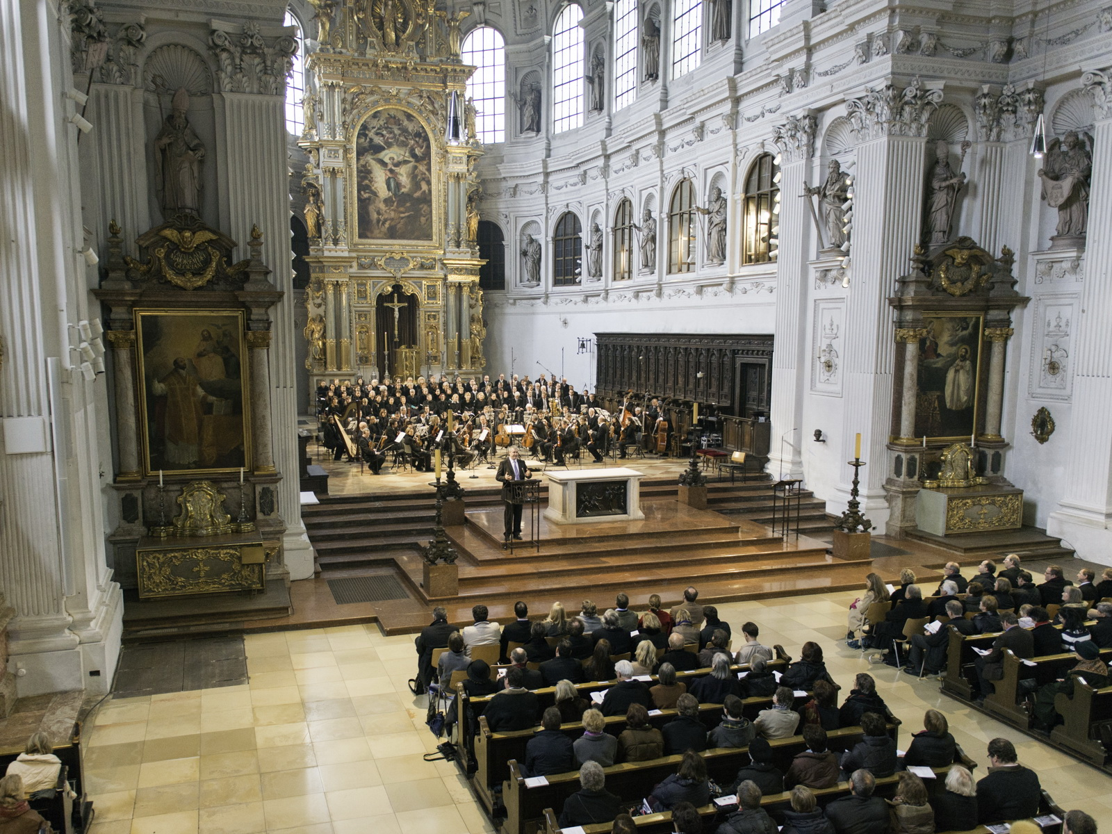 Dr. Frank Höndgen, Künstlerischer Leiter der Kirchenmusik in St. Michael, München dirigiert Reinberger´s Christoforus (Foto: Walter Glück)